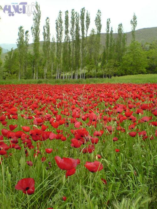 طبيعت سيردان